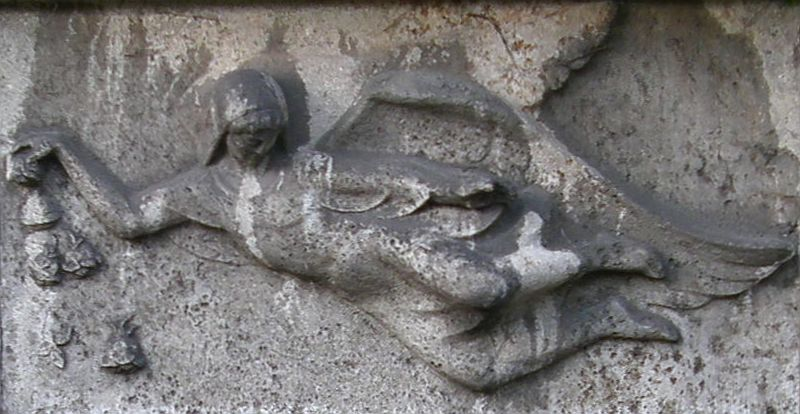 Friedhof Schmargendorf in Berlin; Engelsrelief an einem Wandgrab (ehemaliges Erbbegräbnis, 2003 neu vergeben), Künstler unbekannt.